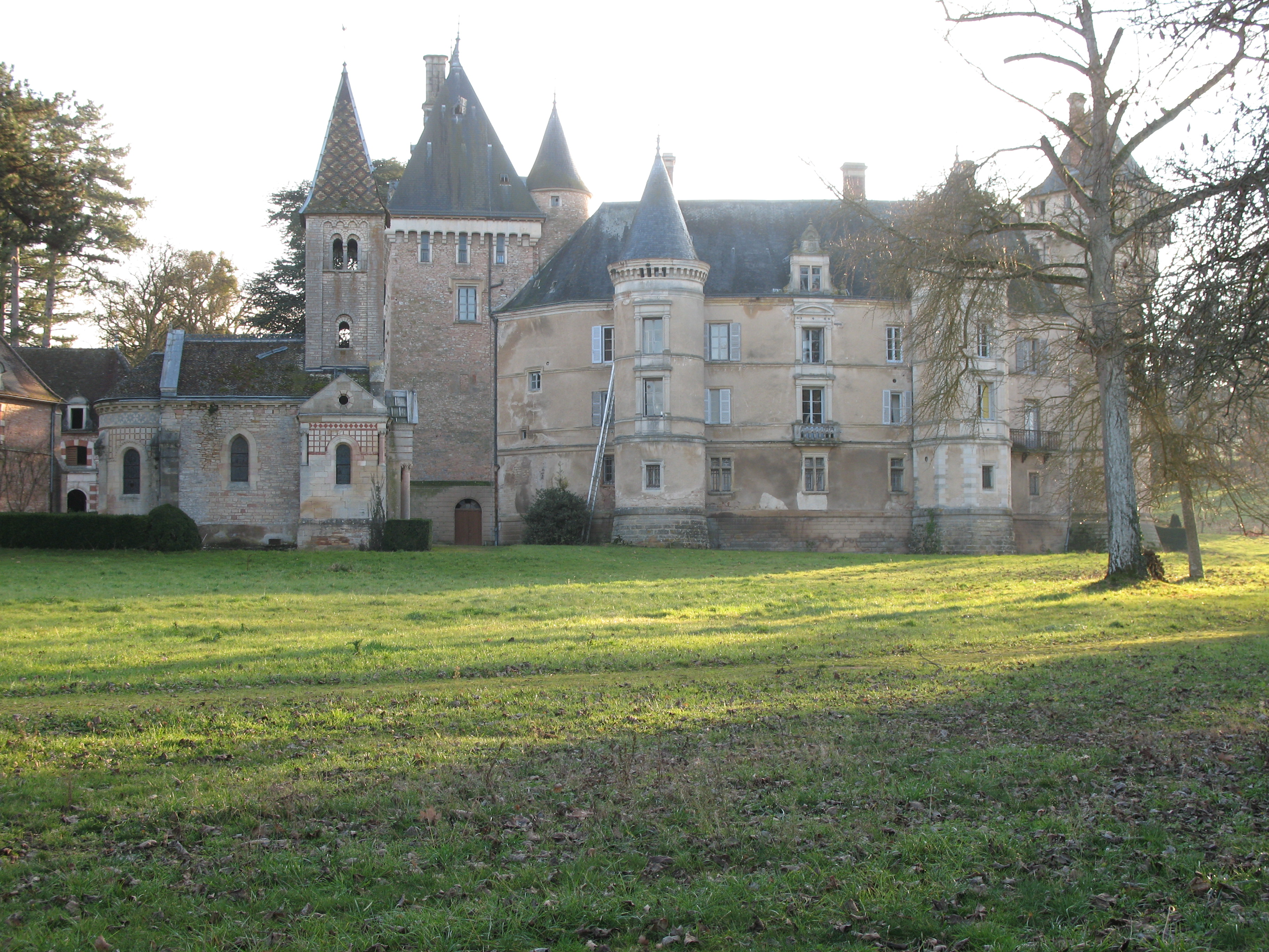 château de Bresse-sur-Grosne (Saône-et-Loire)